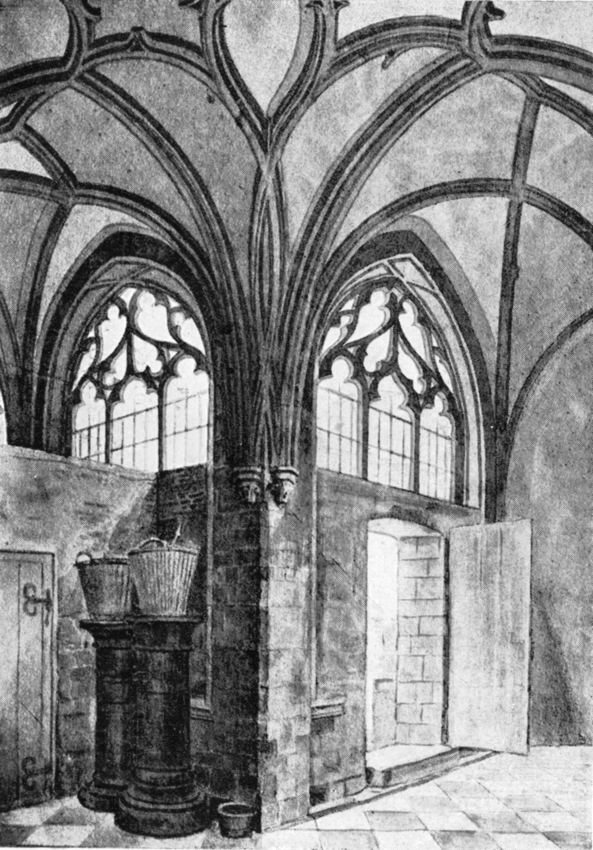 Winkel des großen Kreuzganges um 1840. Zeichnung von Stadtbaumeister Weyer, Köln